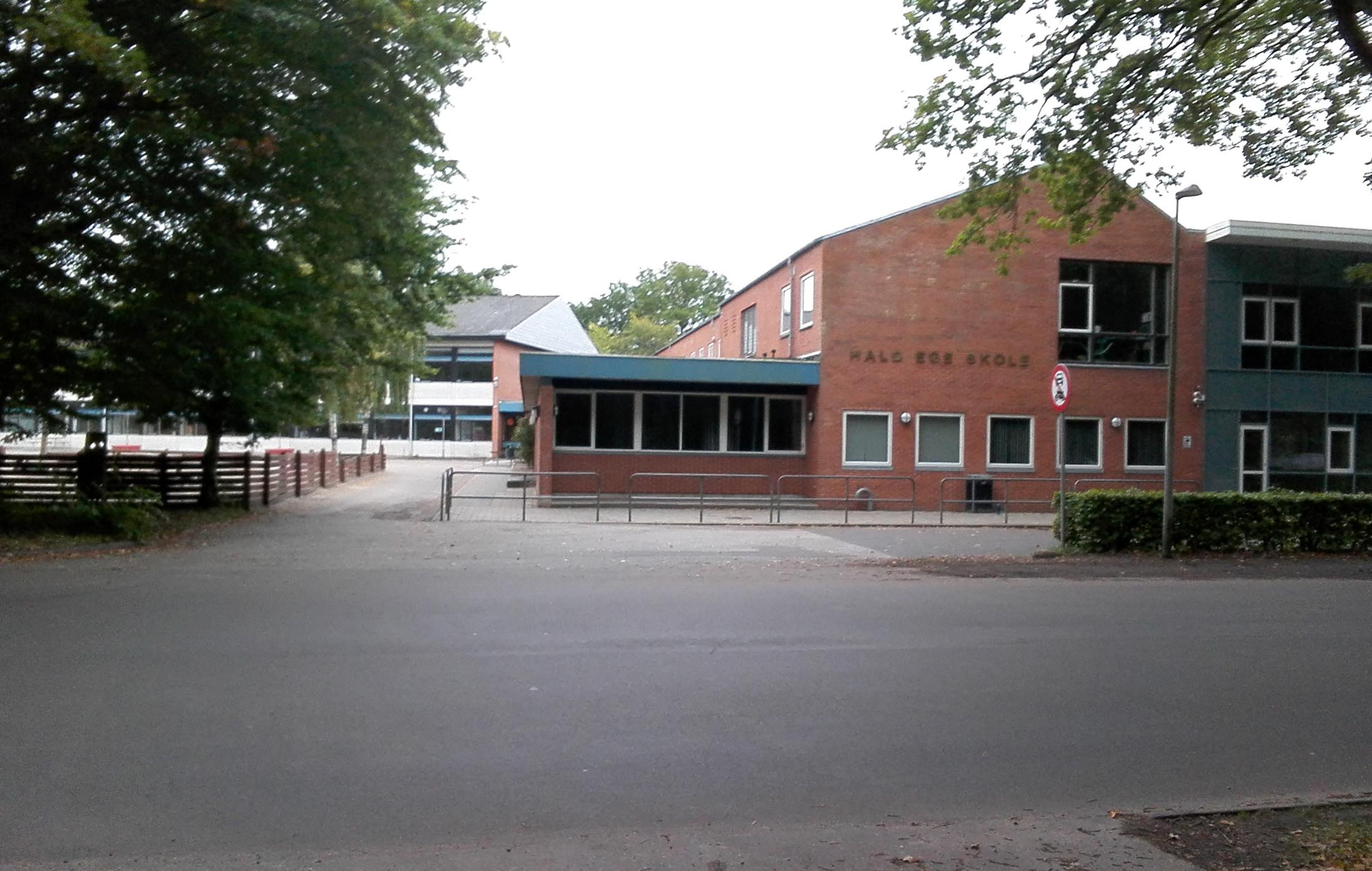 Hald Ege Skole